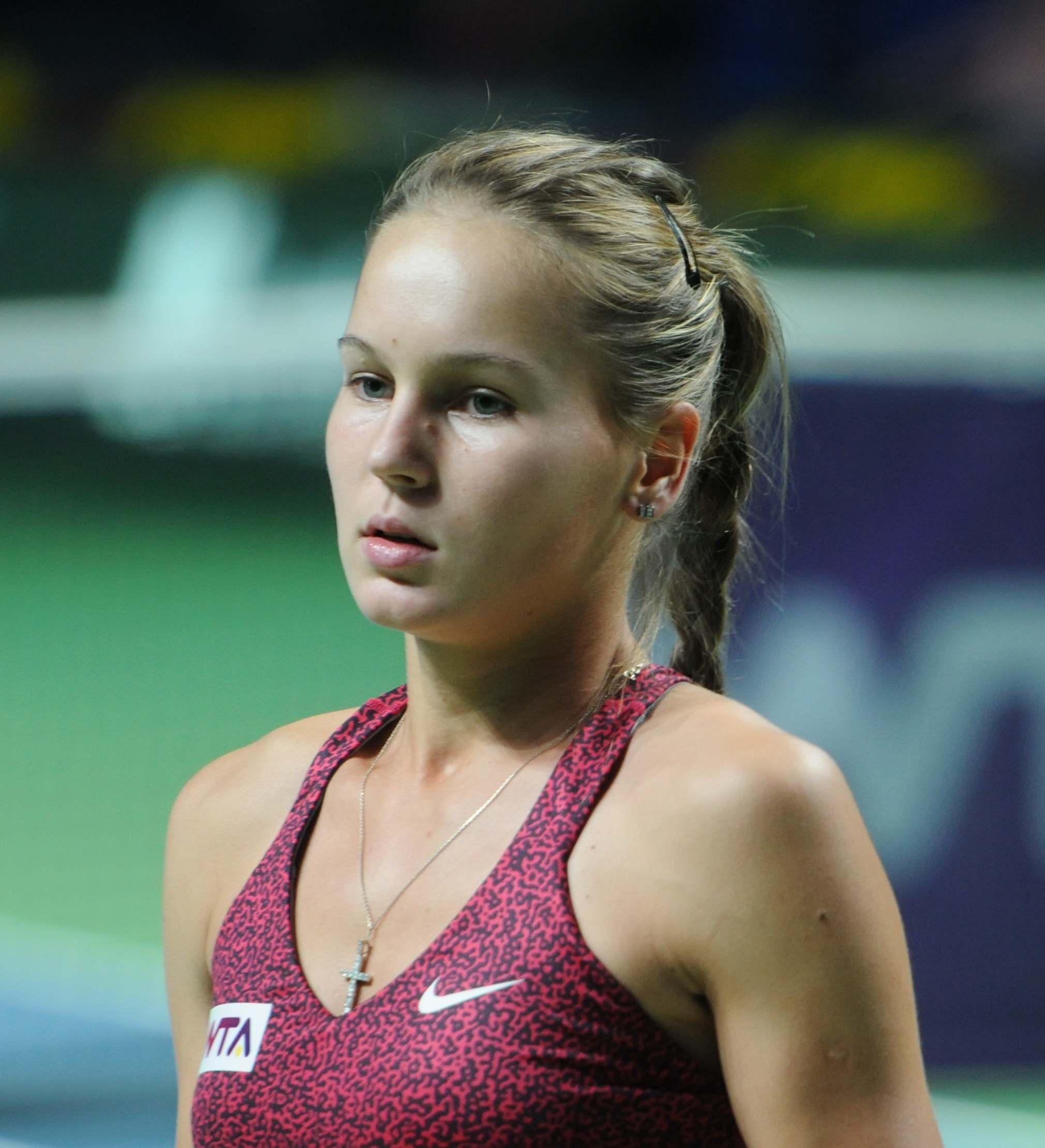 Veronika Kudermetova at the 2014 Kremlin Cup